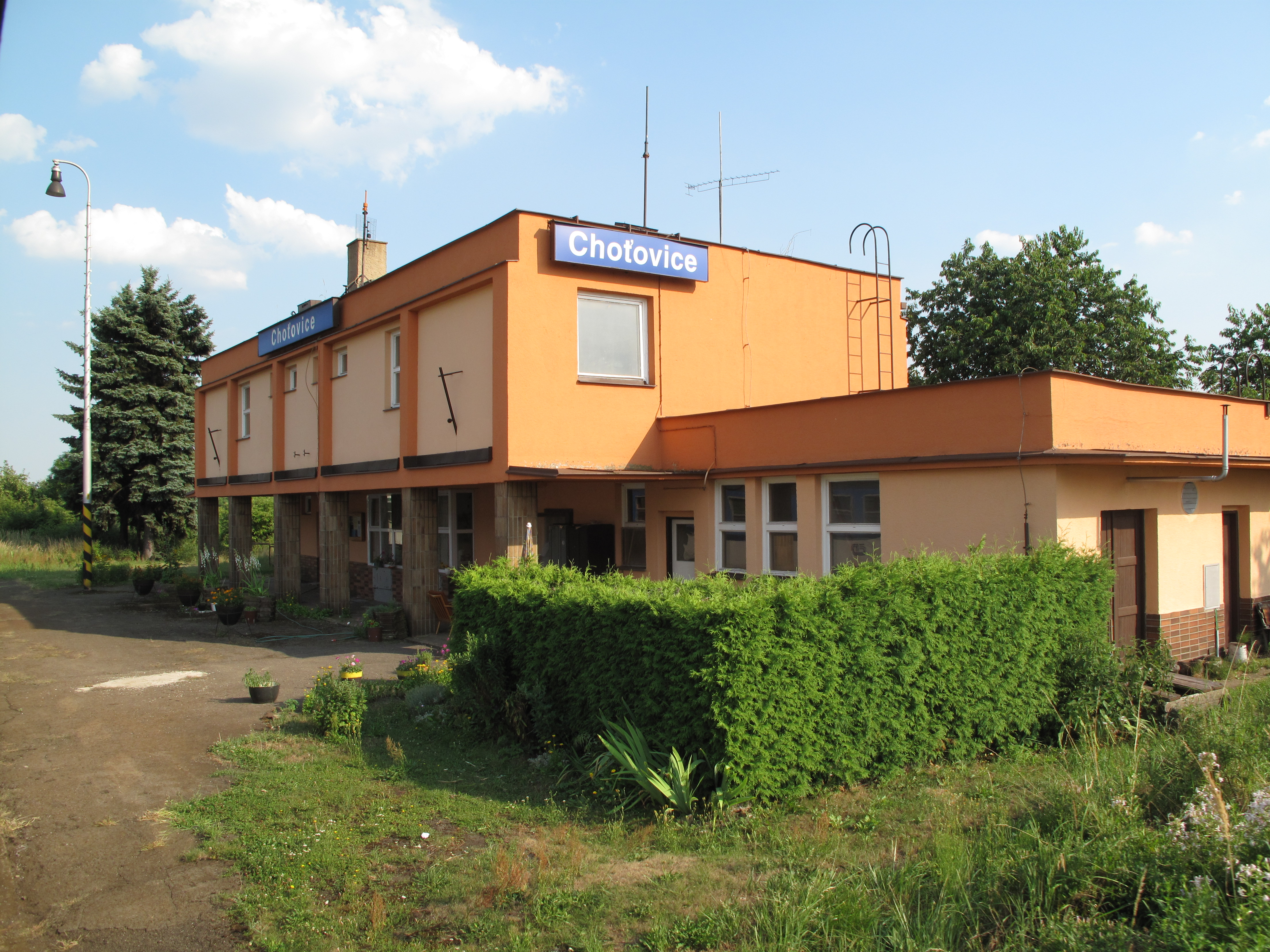 Choťovice, železniční stanice